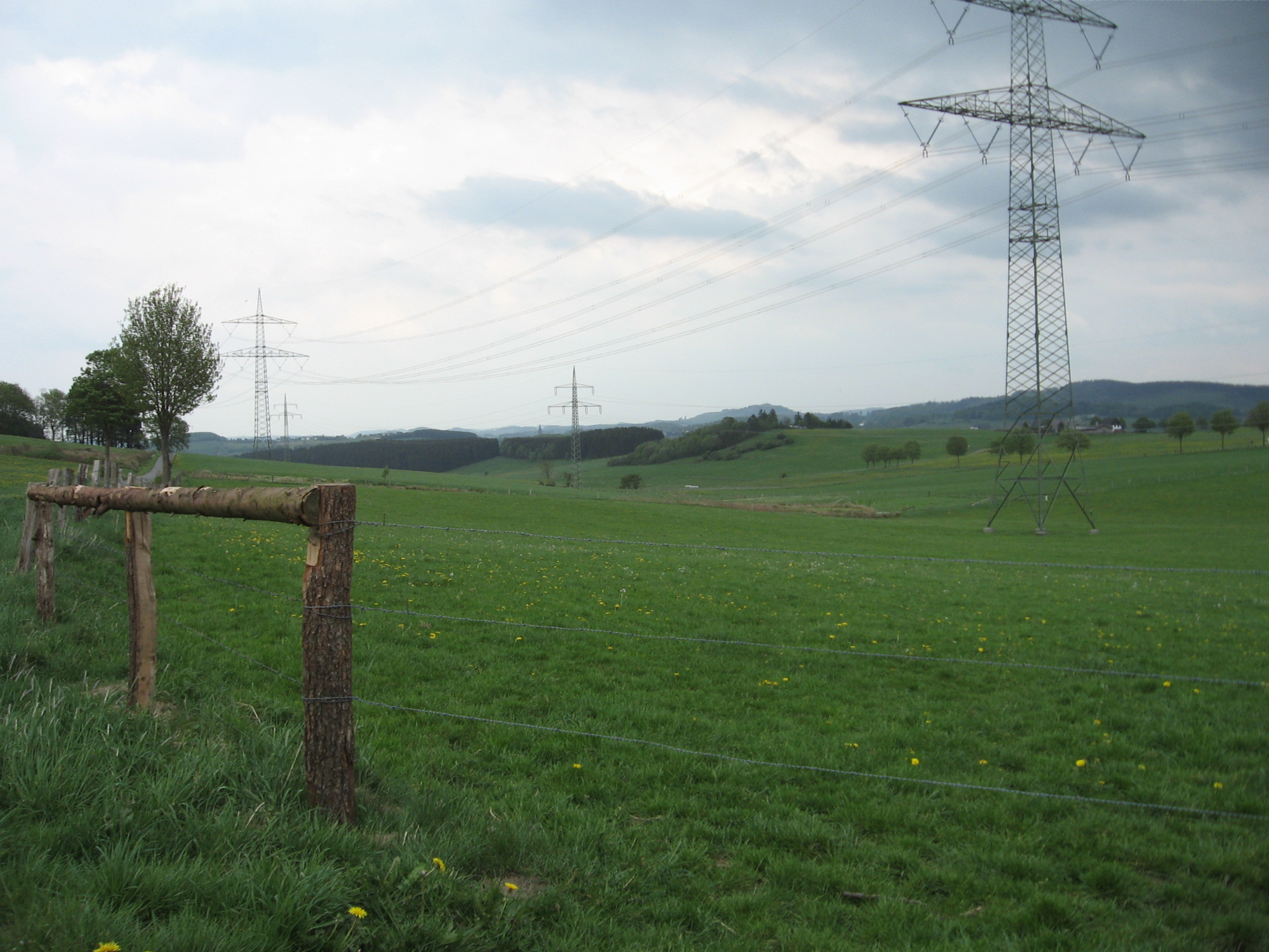 Blick vom westlichen Rand des Landschaftsschutzgebiet Wintertal / Escherfeld nach Osten. Freileitungen (Bl. 4335 und Bl. 1561).